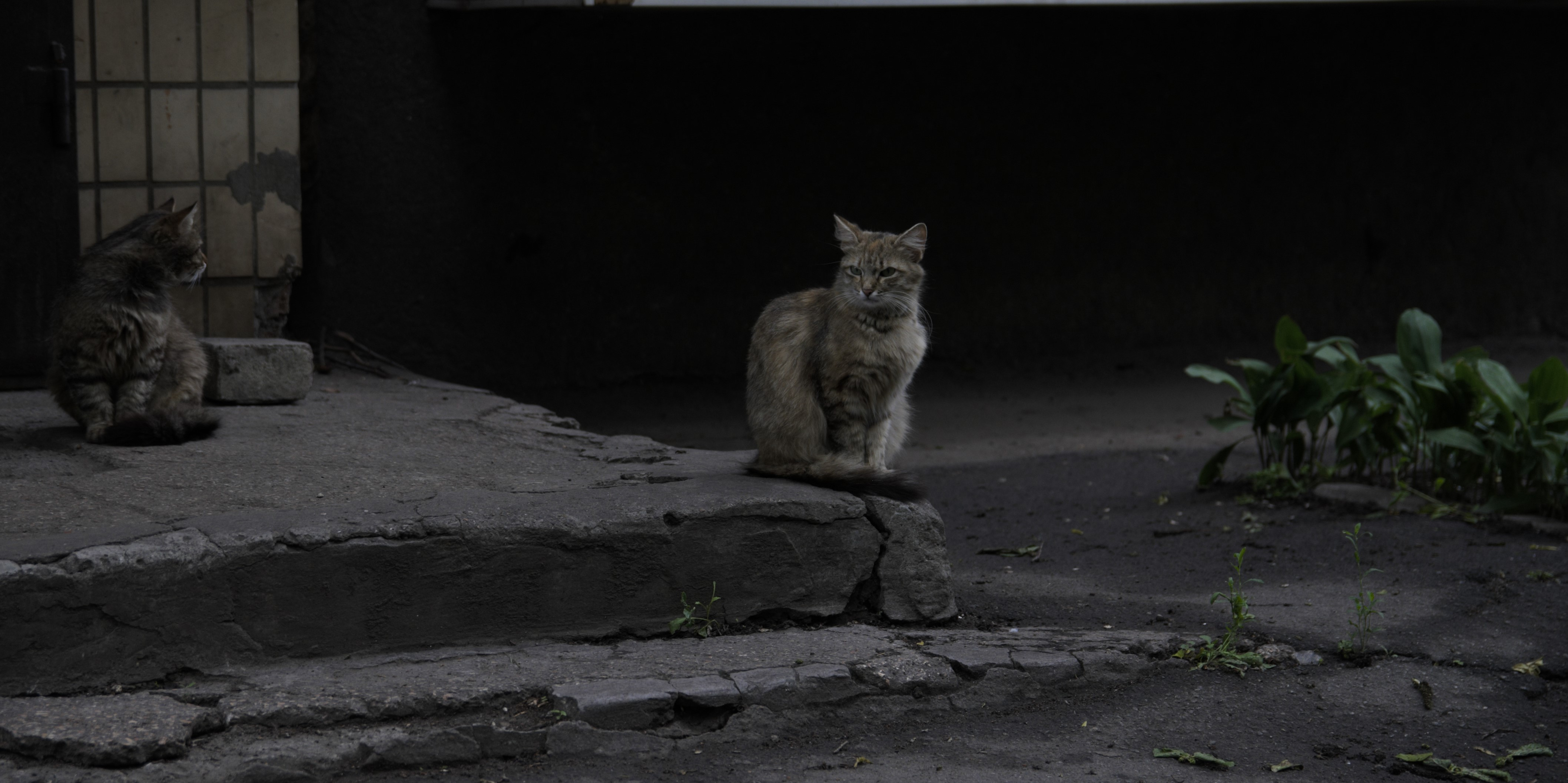 Кошки